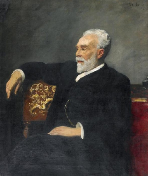 Porträt Emil Heinrich Du Bois-Reymond, 1898